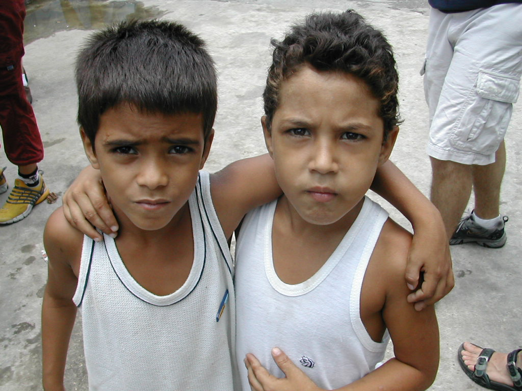 blogged at blogged at